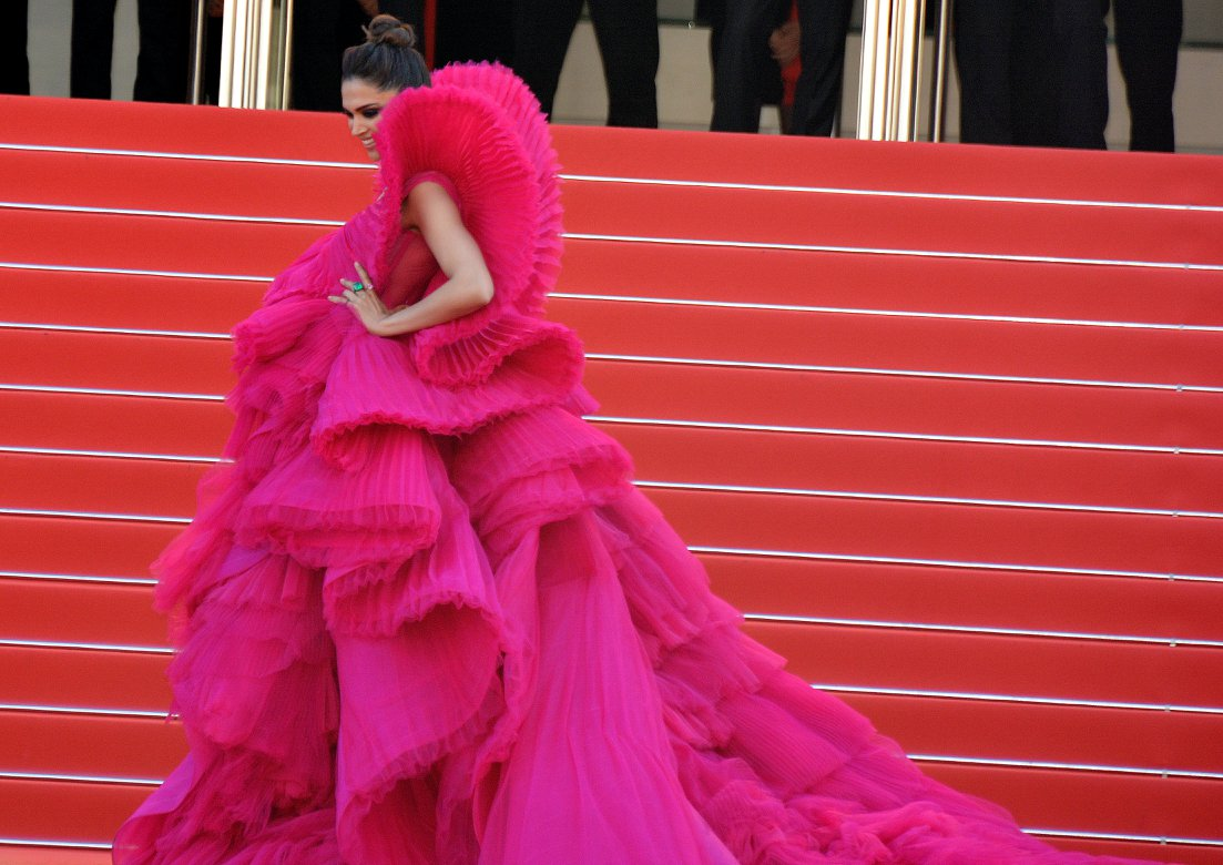 festival de Cannes